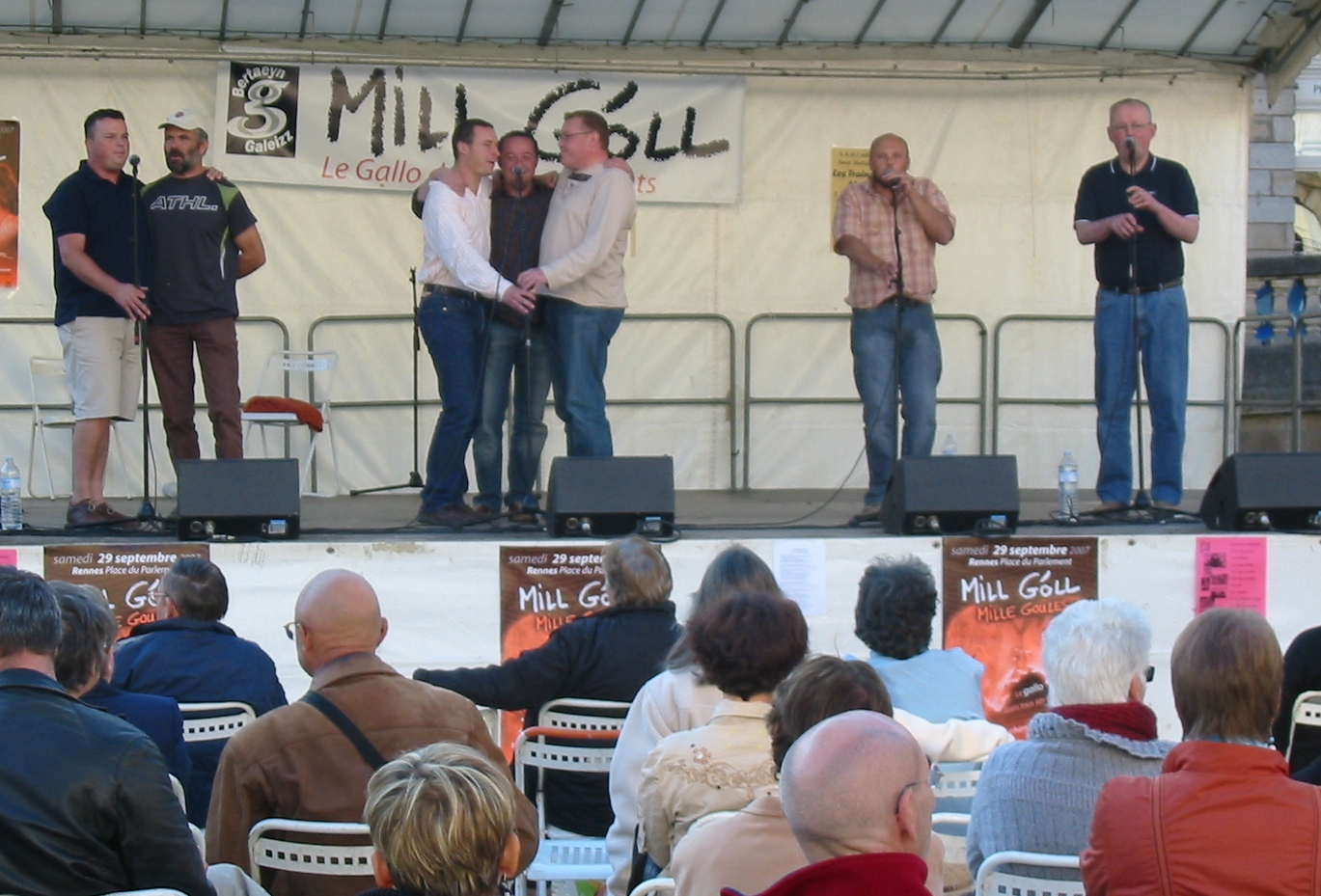 Les Traines Meuriennes: Chanteurs à la Fête Mill Góll en Pays Gallo 2007